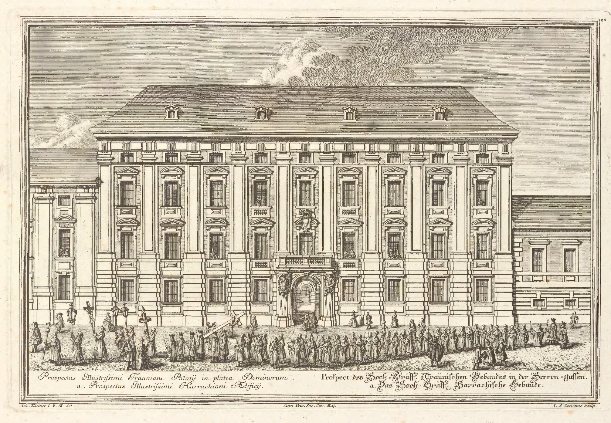 "Prospekt des Hoch-Gräfflichen Traunischen Gebäudes in der Herrengasse", in Vienna's I. district Innere Stadt (Vienna) at Herrengasse #14.